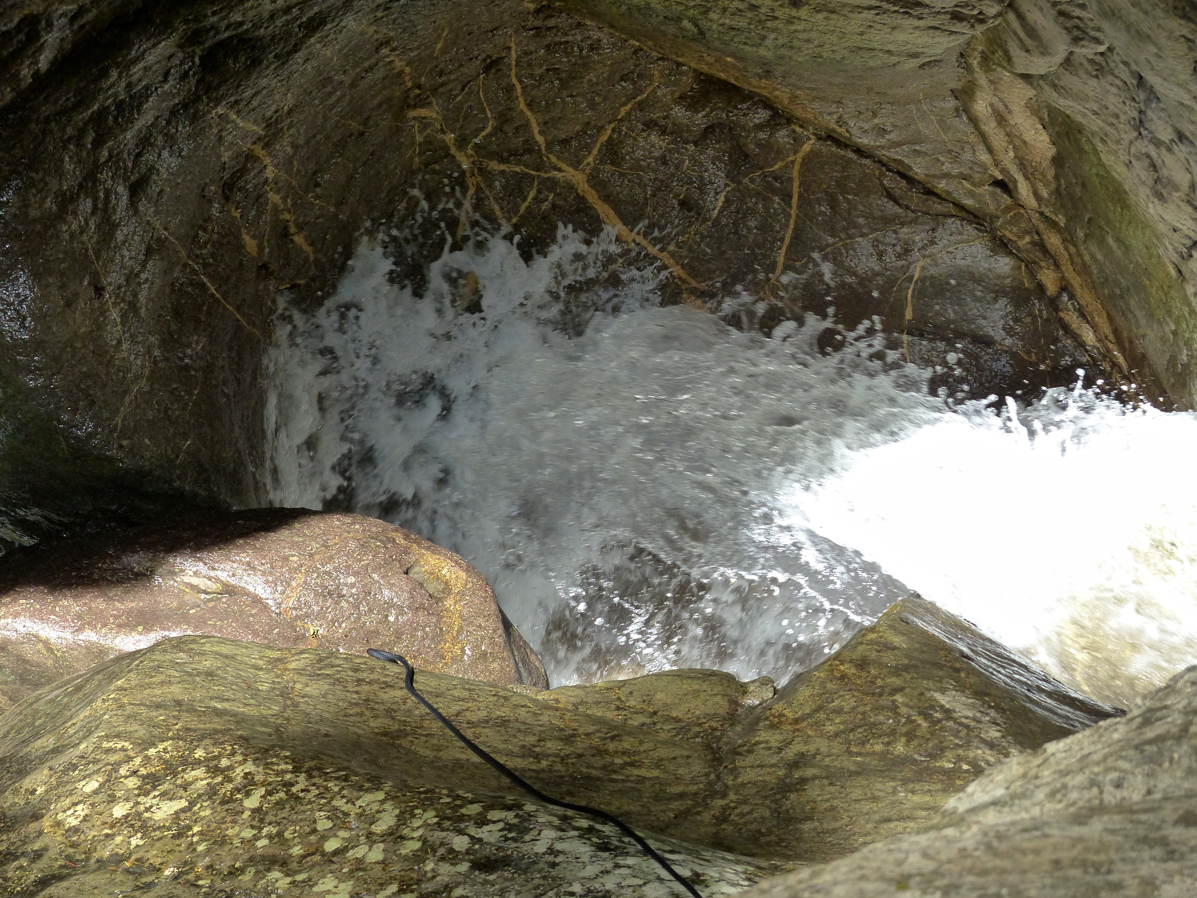 WikiProjekt Landstreicher: Starzlachklamm